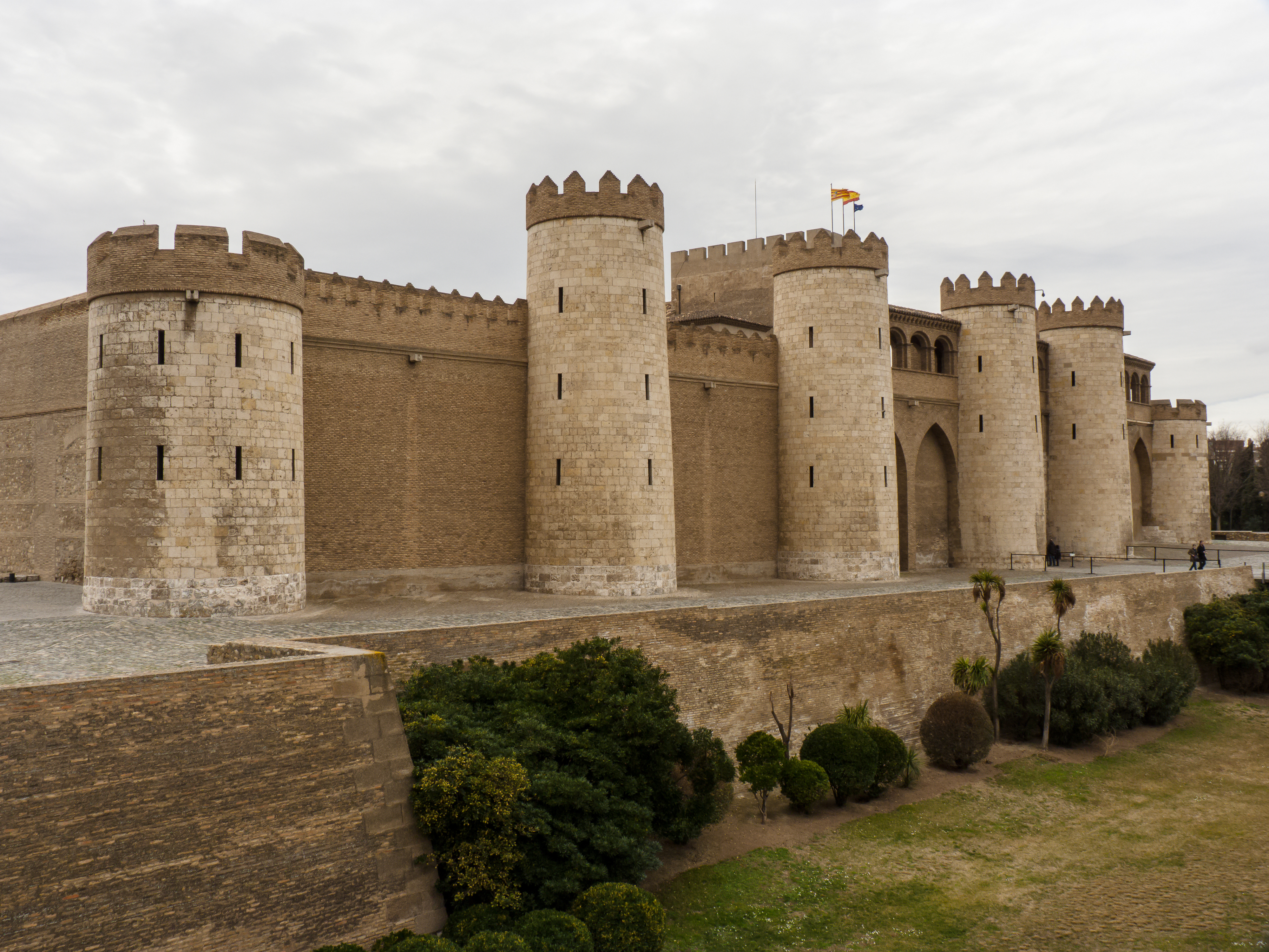 CS 07022010 #130510 #51347.jpg